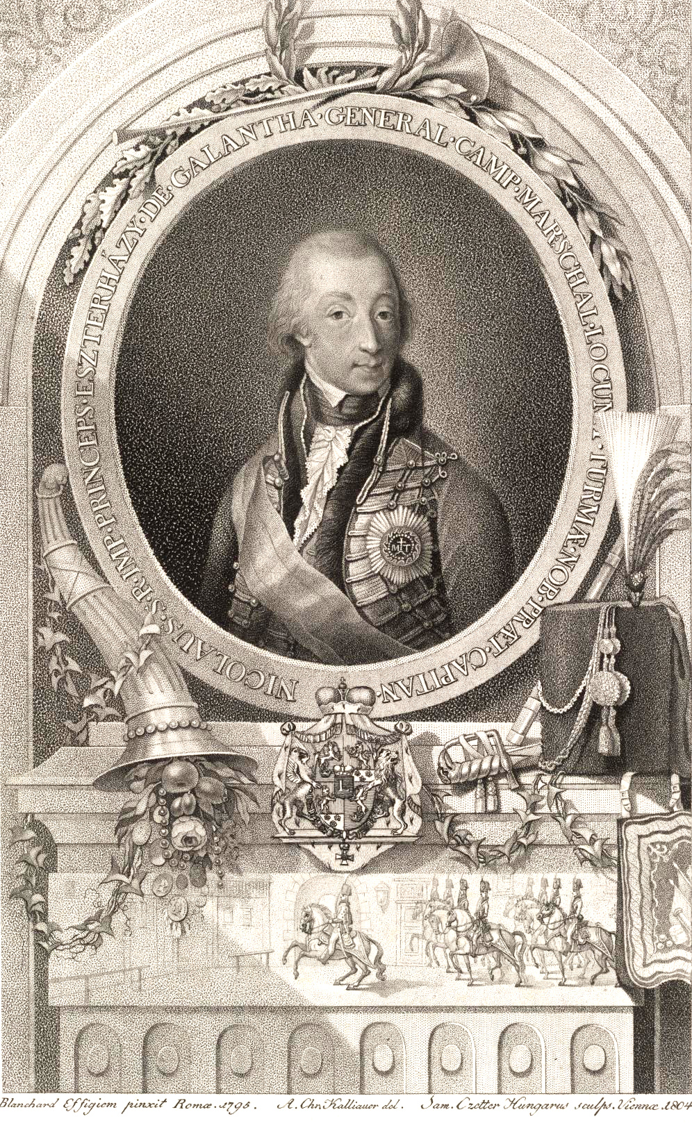 Esterházy Miklós birodalmi herceg (Bécs, 1765. december 12. – Como, 1833. november 25.) portréja az Esterházy család tagja, táborszernagy és műgyűjtő, Esterházy Antal tábornok (1738–1794) fia, a „pompakedvelő” Esterházy Miklós (1714–1790) unokája.